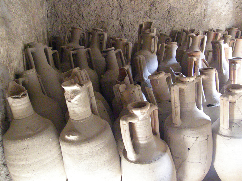 Villa Poppaea (Torre Annunziata)